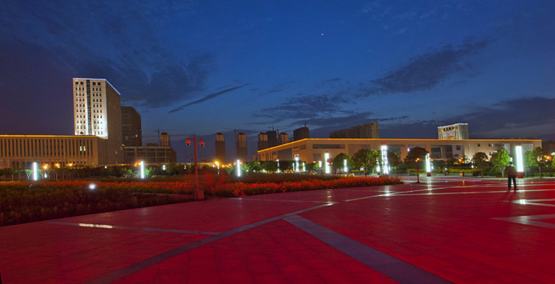 在信阳扫描